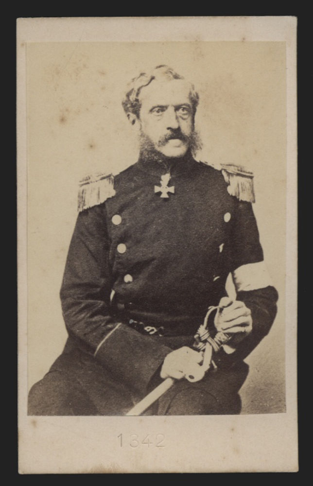 Bernhard von Langenbeck (1810-1887) als Generalstabsarzt im Deutsch-Dänischen Krieg, carte de visite 1864.